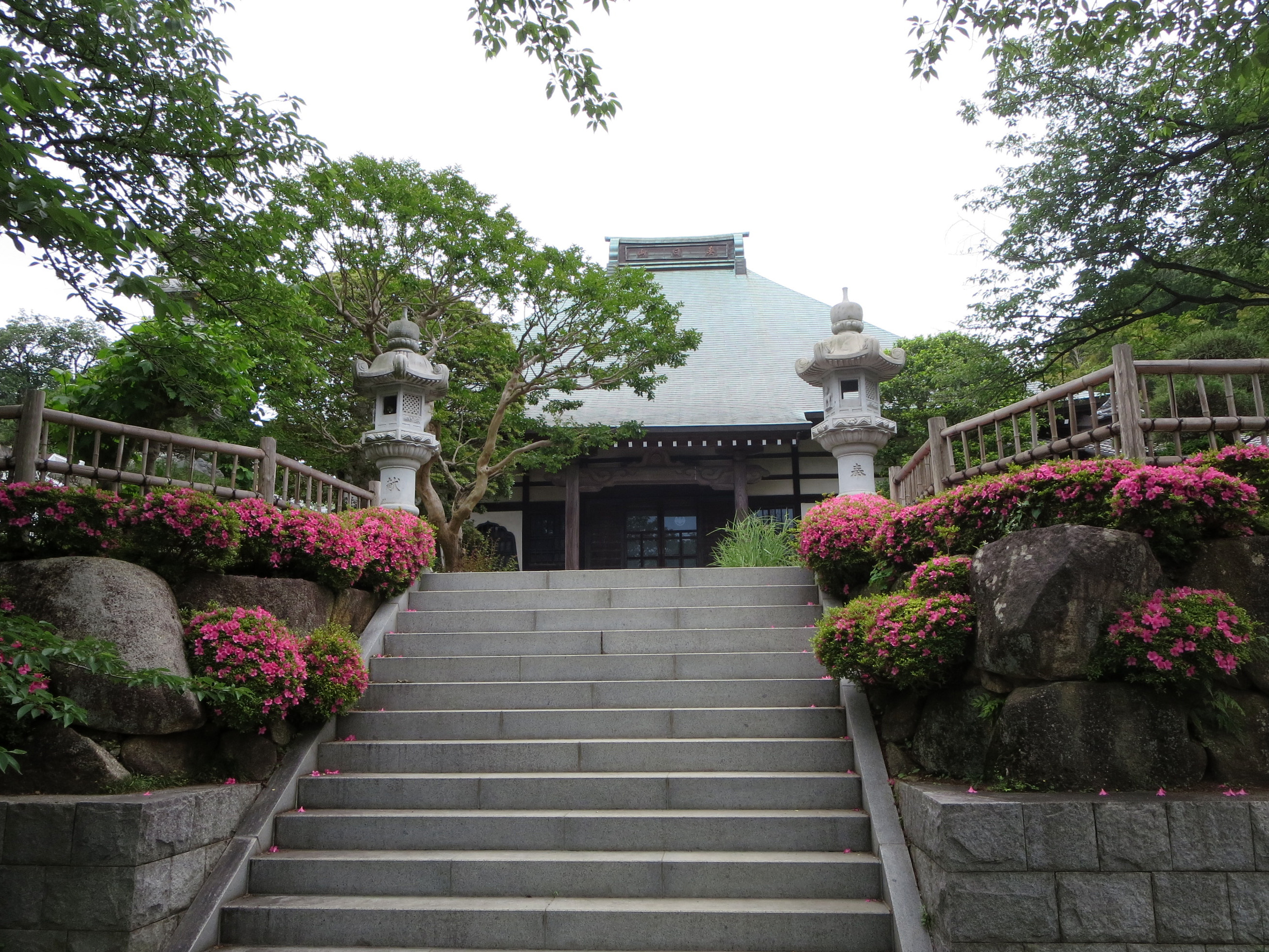 鳳勝寺（海老名市勝瀬）